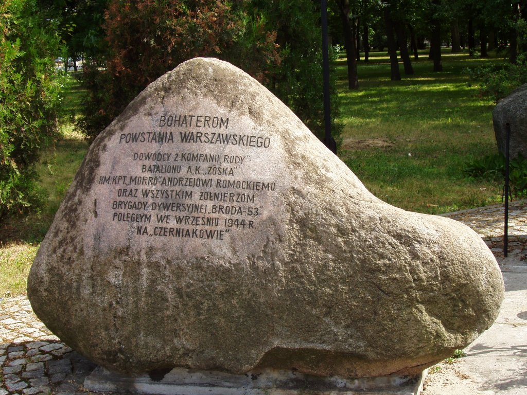 Pamięci Andrzeja Romockiego "Morro". Wybrzeże Czerniakowskie w Warszawie (fot Zu)